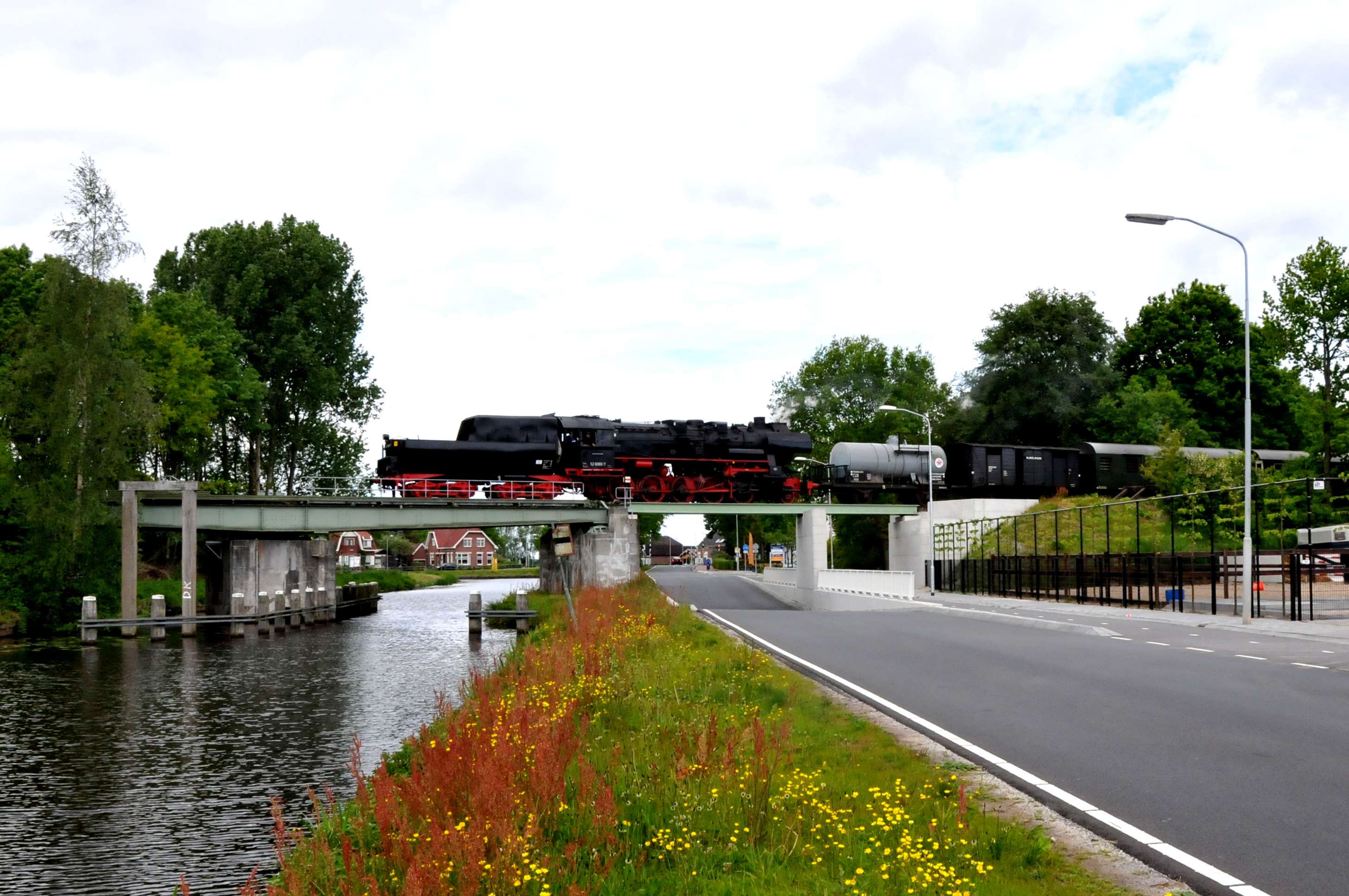 Lokomotief 52 8060 van de Stichting Stadskanaal Rail met trein op de spoorbrug bij Wildervank.